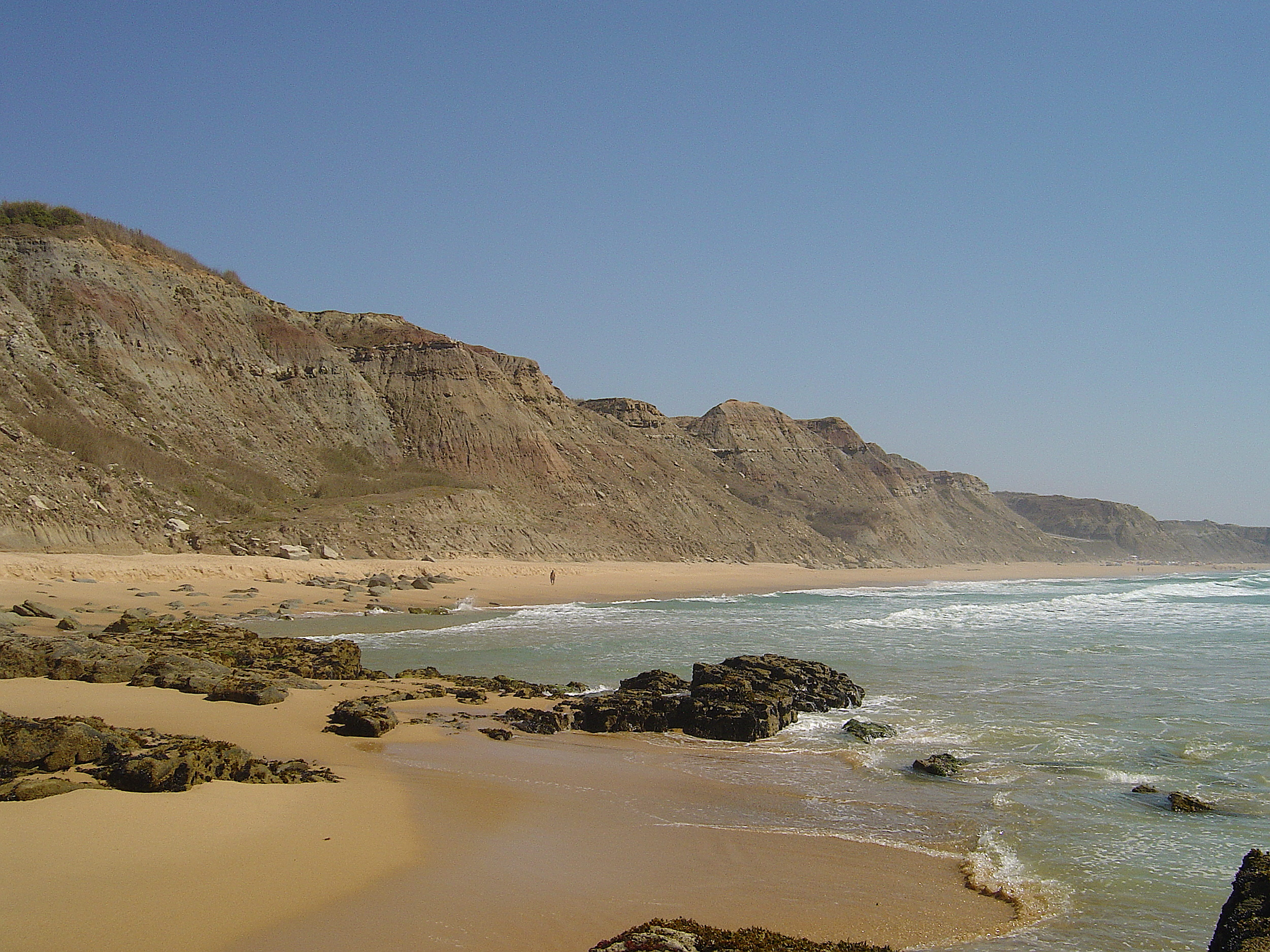 Praia da Peralta vista da Praia do Areal Sul ( Portugal )